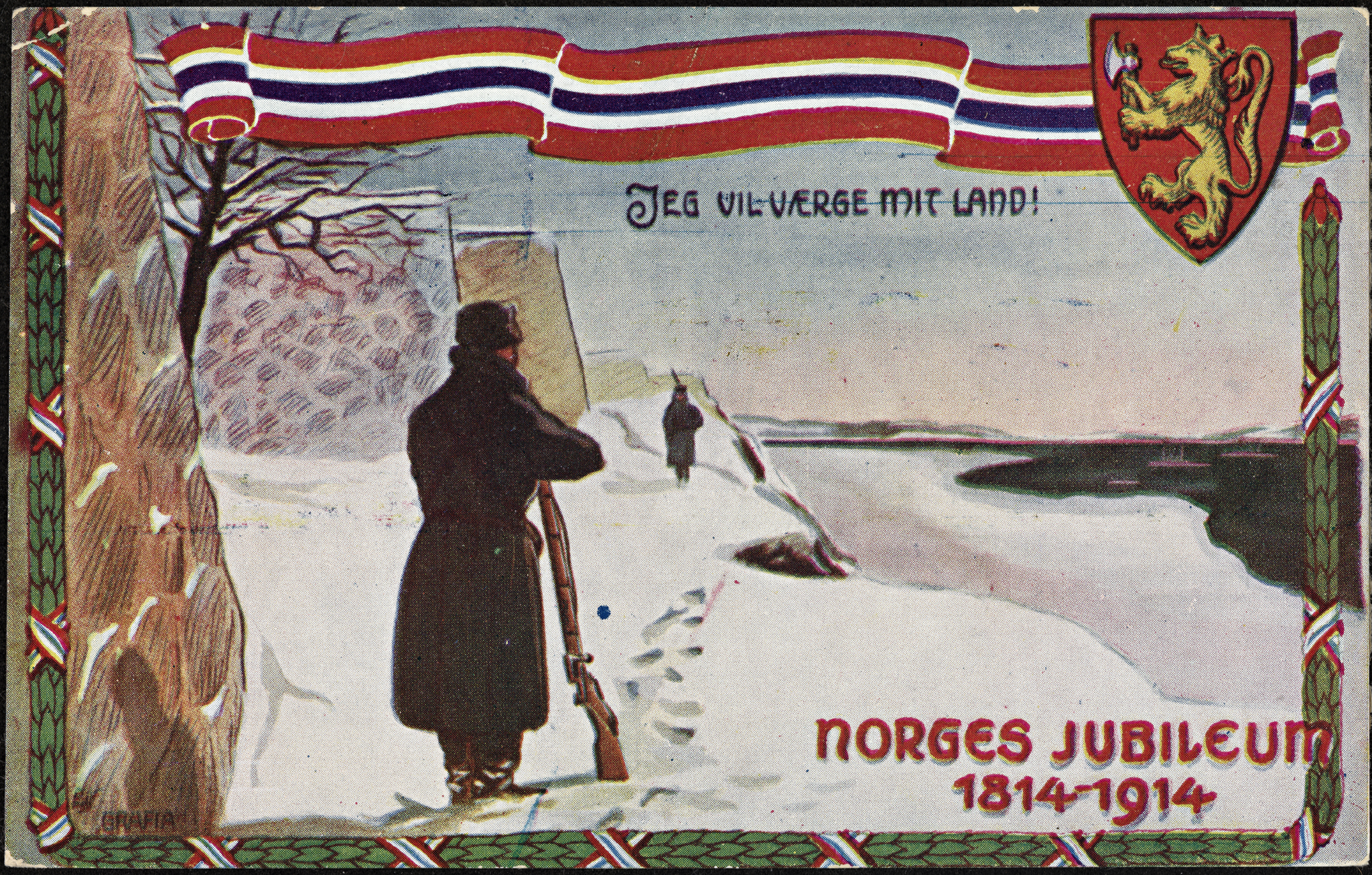 Tittel / Title: Norges Jubileum 1814-1914 Beskrivelse / Description: Postkort. Sitat fra Bjørnstjerne Bjørnsons dikt. Kunstner / Artist: Grafia Utgiver / Publisher: Oppi Utgitt / Published: 1914 Eier / Owner Institution: Nasjonalbiblioteket / National Library of Norway Lenke / Link: Bildesignatur / Image Number: blds_05705